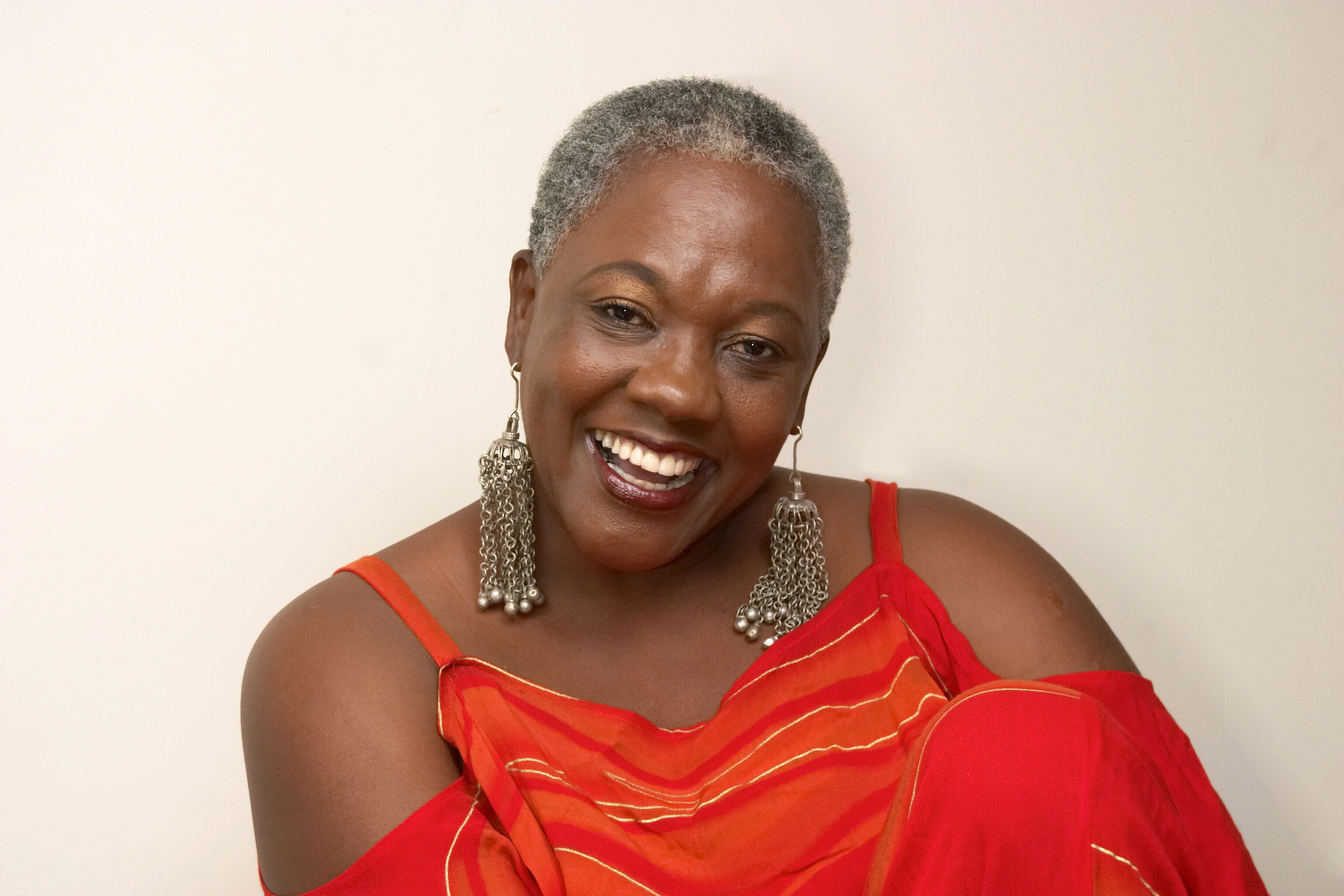 Presentatrice, cabaretiere van Surinaamse afkomst